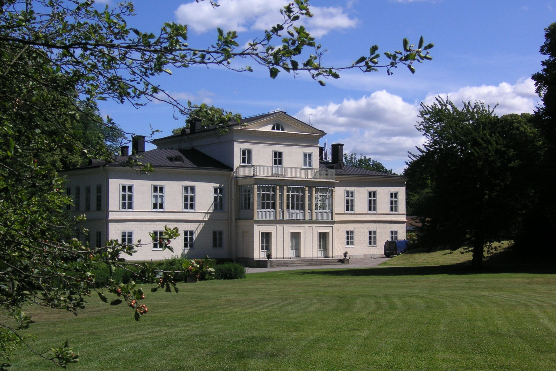 Haga slott i Hagaparken, fasad mot parken (baksida)